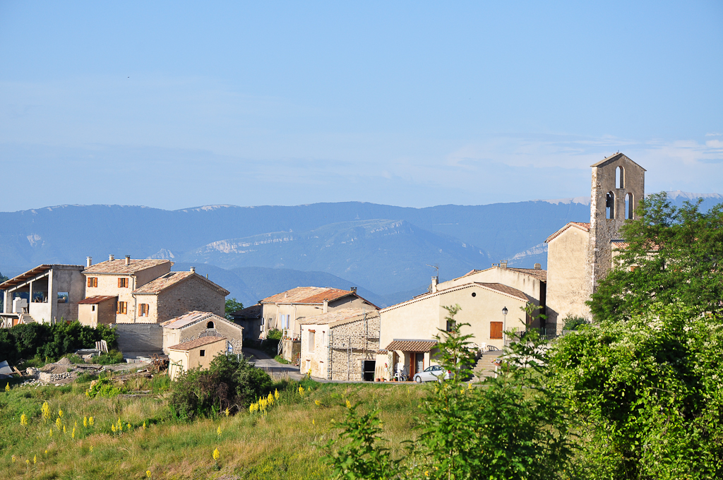 Sigoyer, village et église